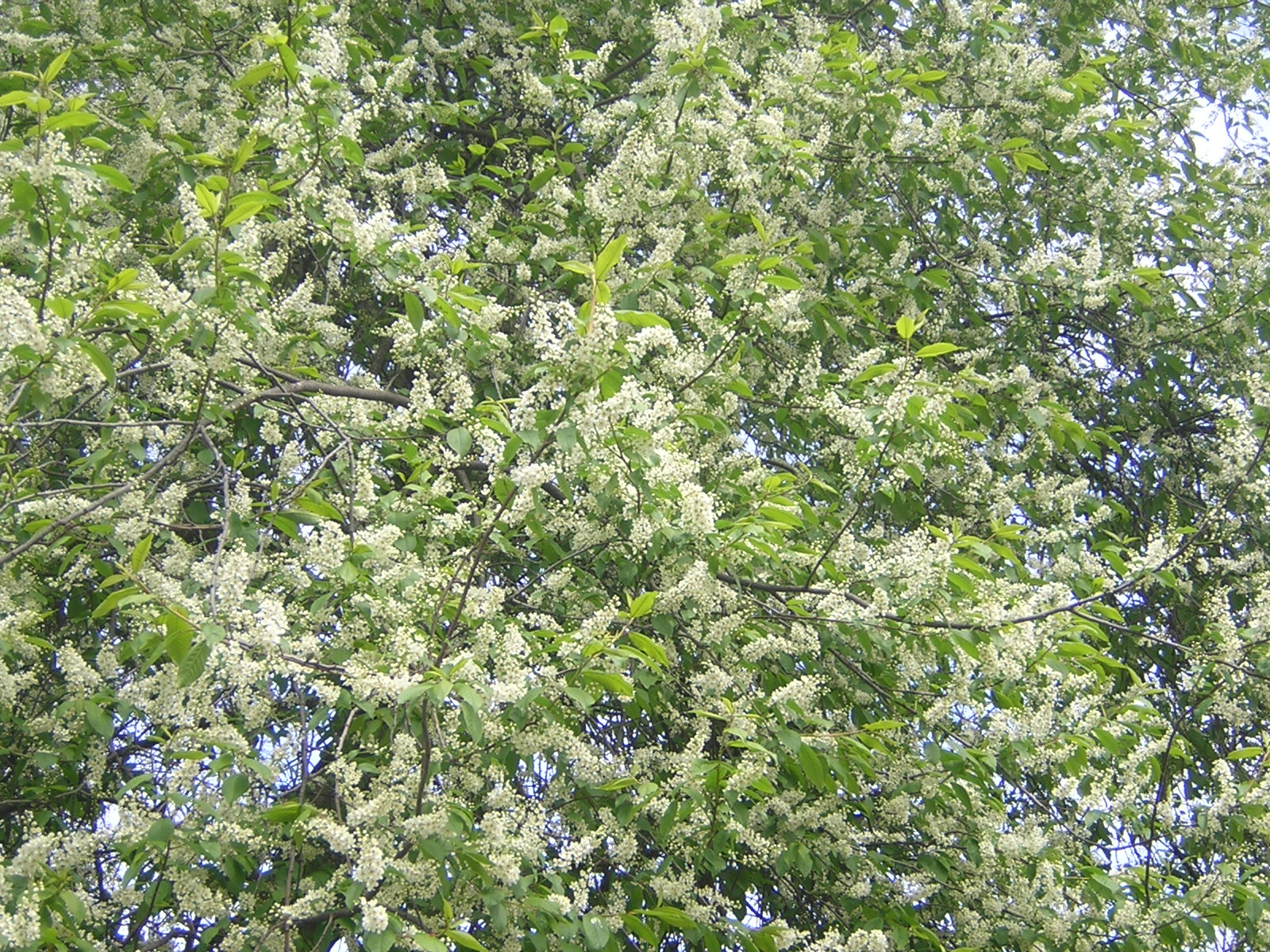 Prunus padus (syn. Padus racemosa (Lam.) Gilib.). Flowering. Russia, Ukhta. Черёмуха обыкновенная, цветение. Россия, Ухта